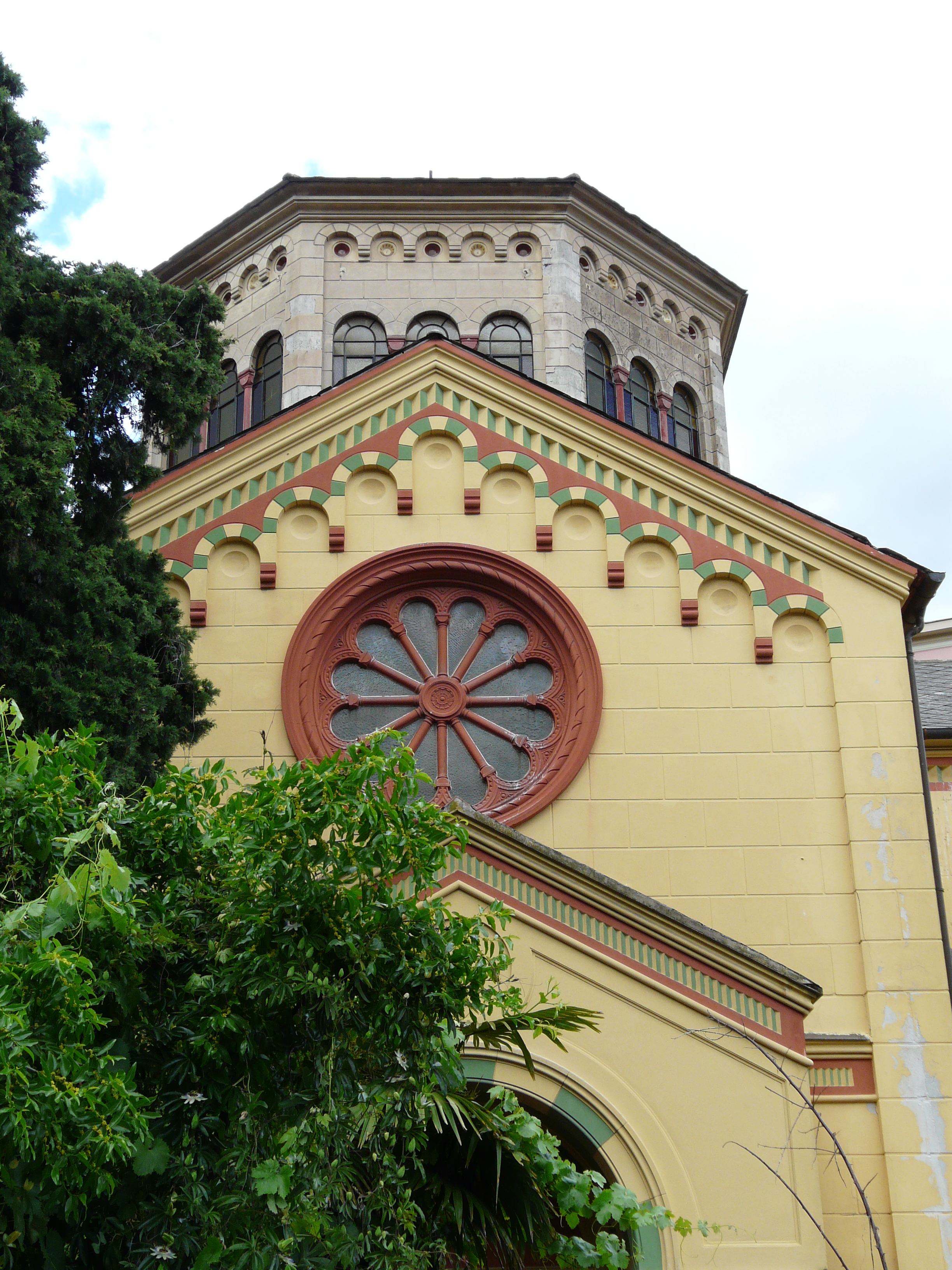 Ex chiesa anglicana, Rapallo, Liguria, Italia